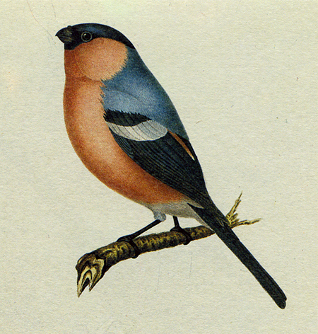 Снегирь